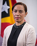 Signi Chandrawati Verdial